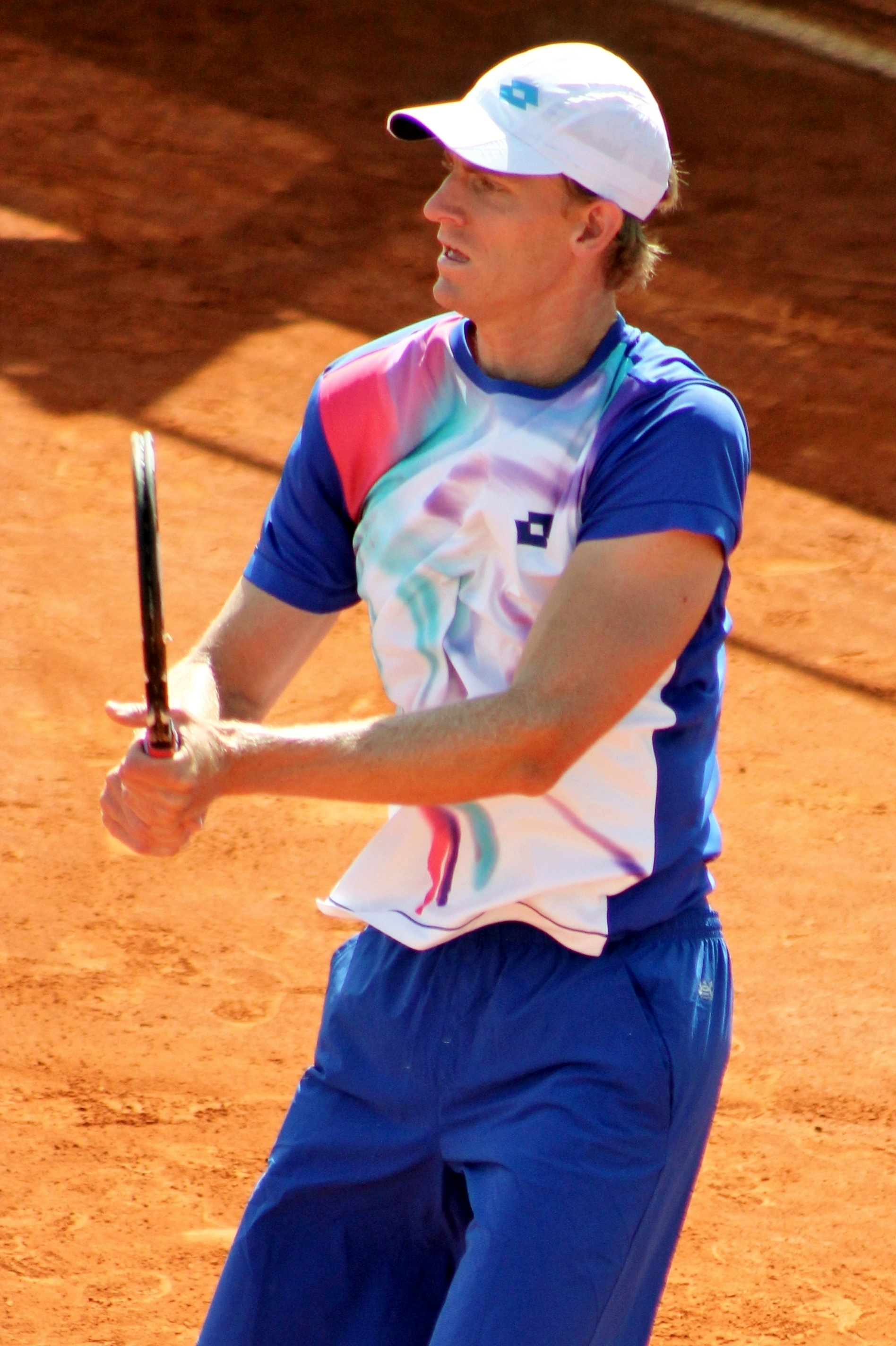 Anderson MA14 (17)